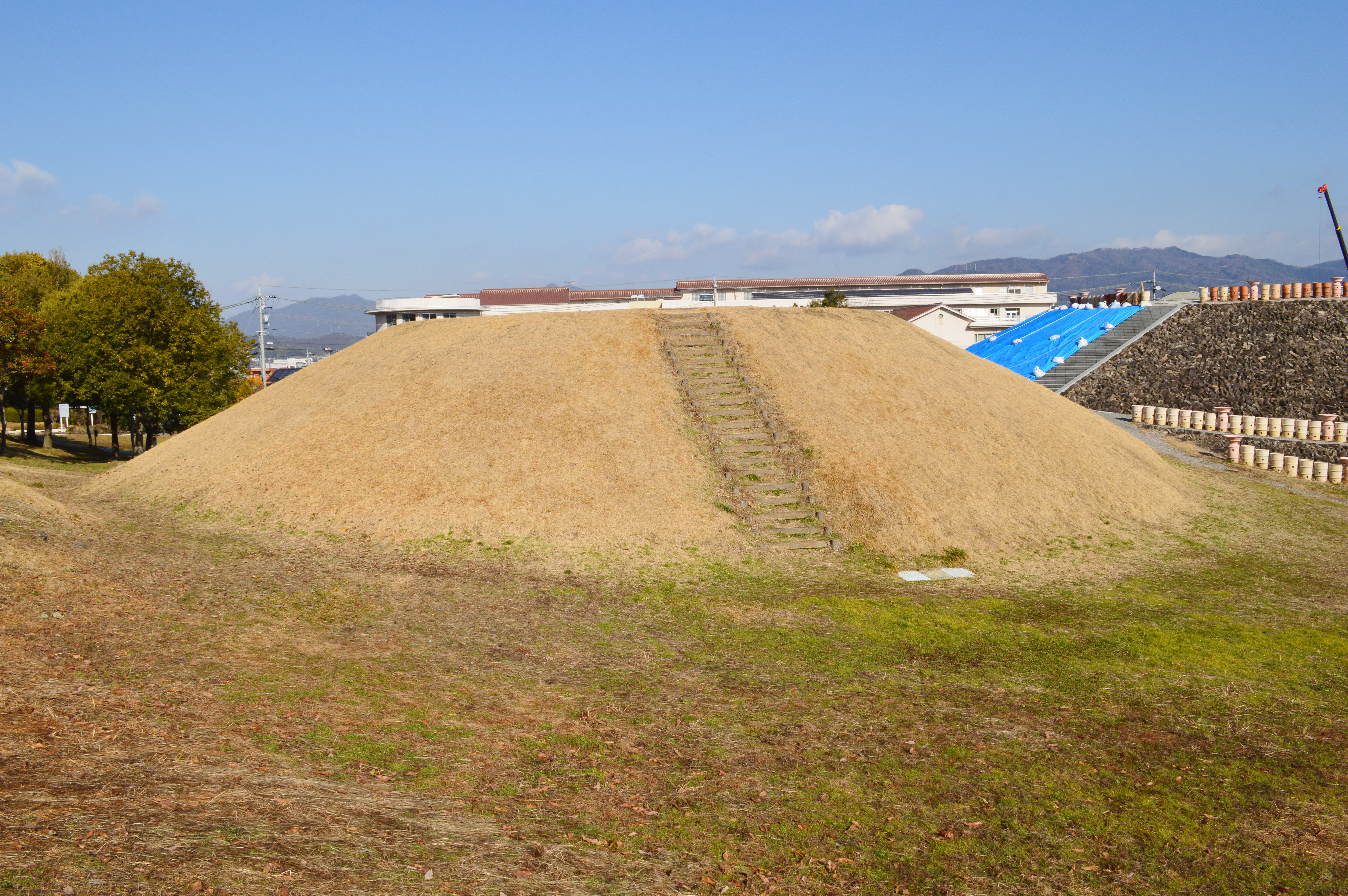 三ツ城2号墳 墳丘